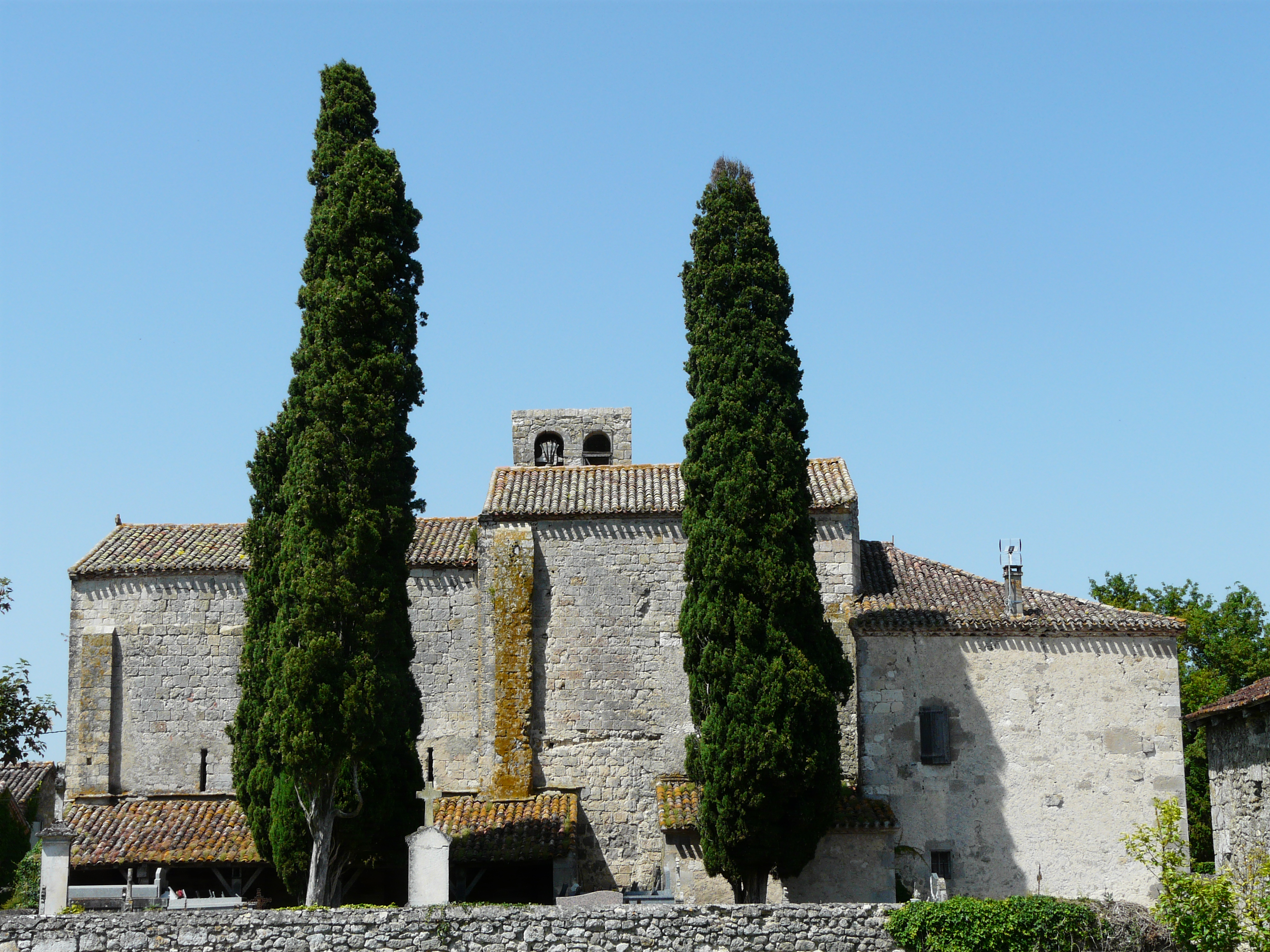 Le côté sud de l'église Saint-Étienne de Fontarède, Moncaut, Lot-et-Garonne, France.